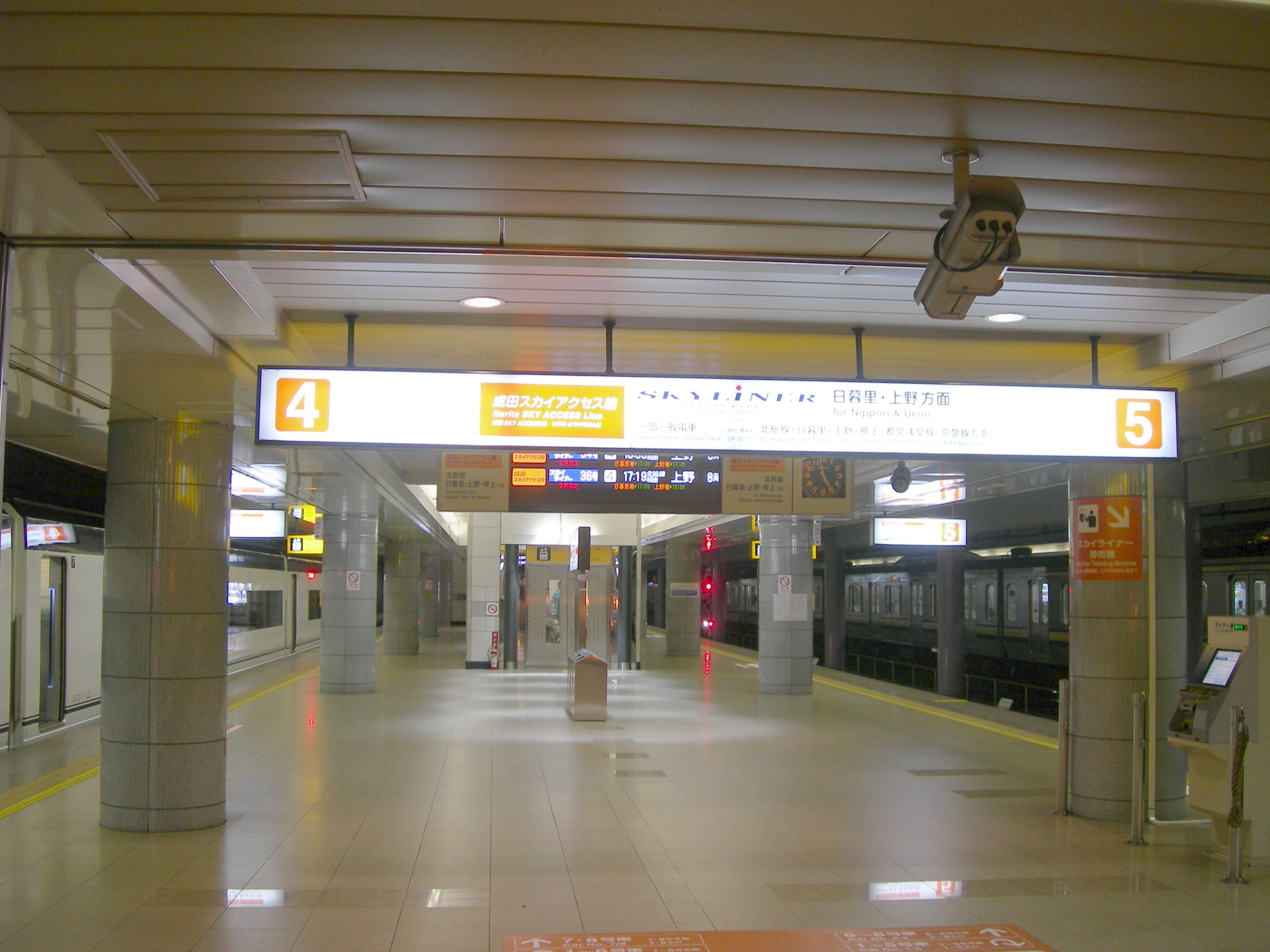 京成電鉄 成田空港駅4・5番ホーム(成田スカイアクセス線・スカイライナー用ホーム)